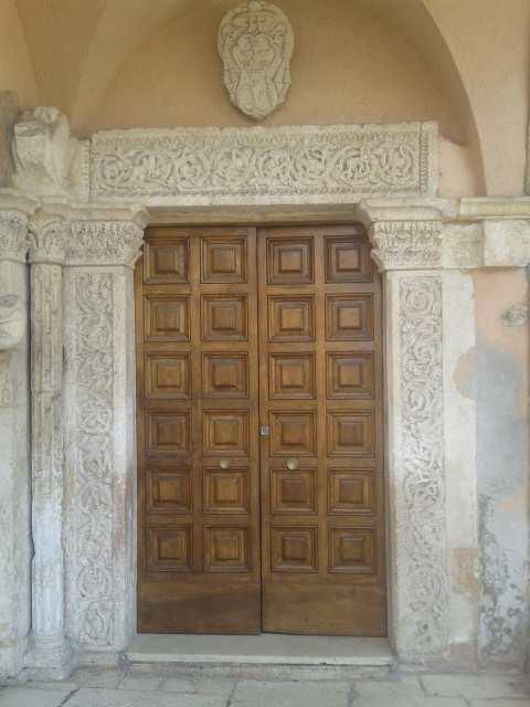 Portale delle donne